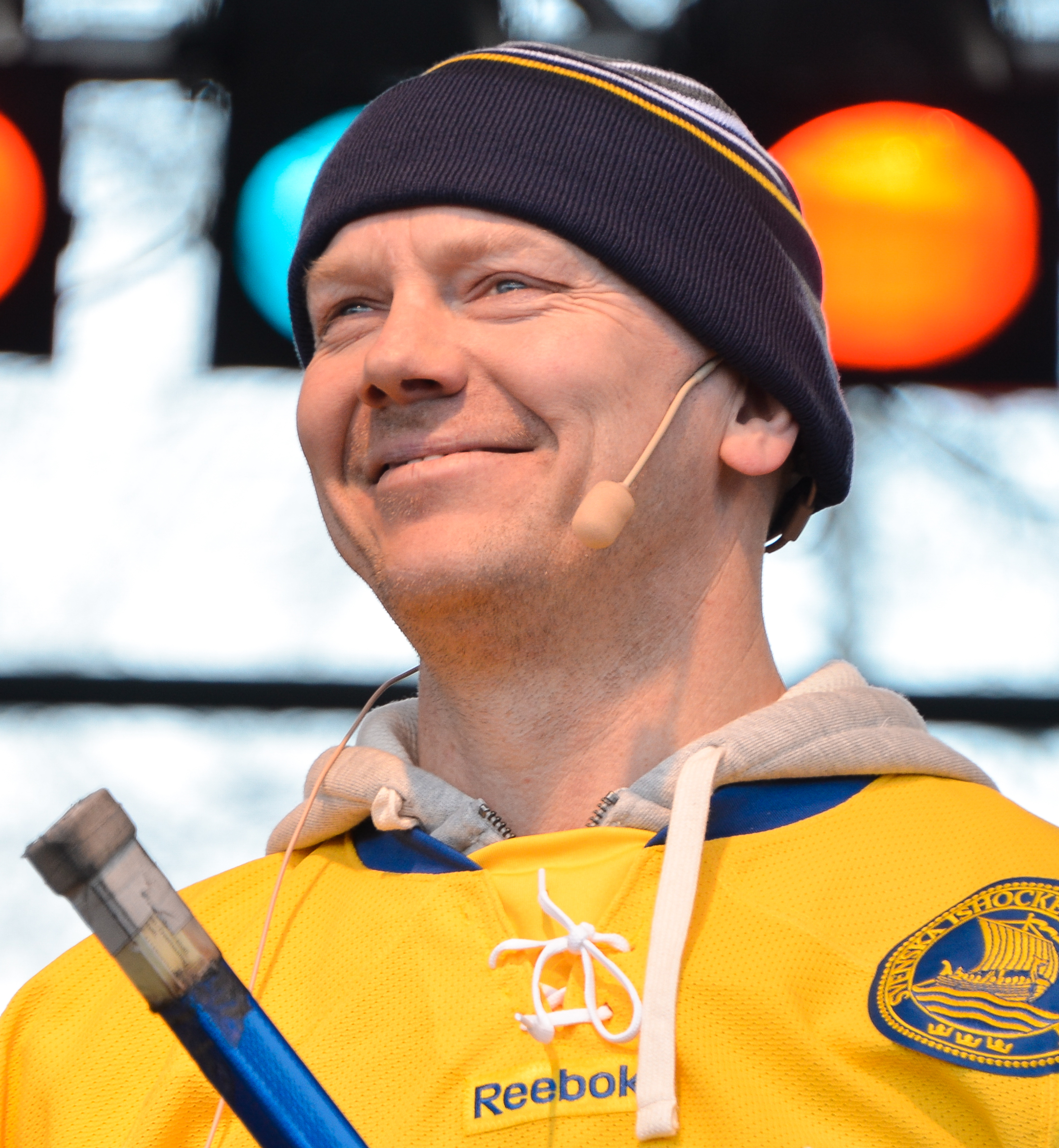 Mats Sundin under Hockeyns Dag i Kungsträdgården i Stockholm den 7 februari 2015.